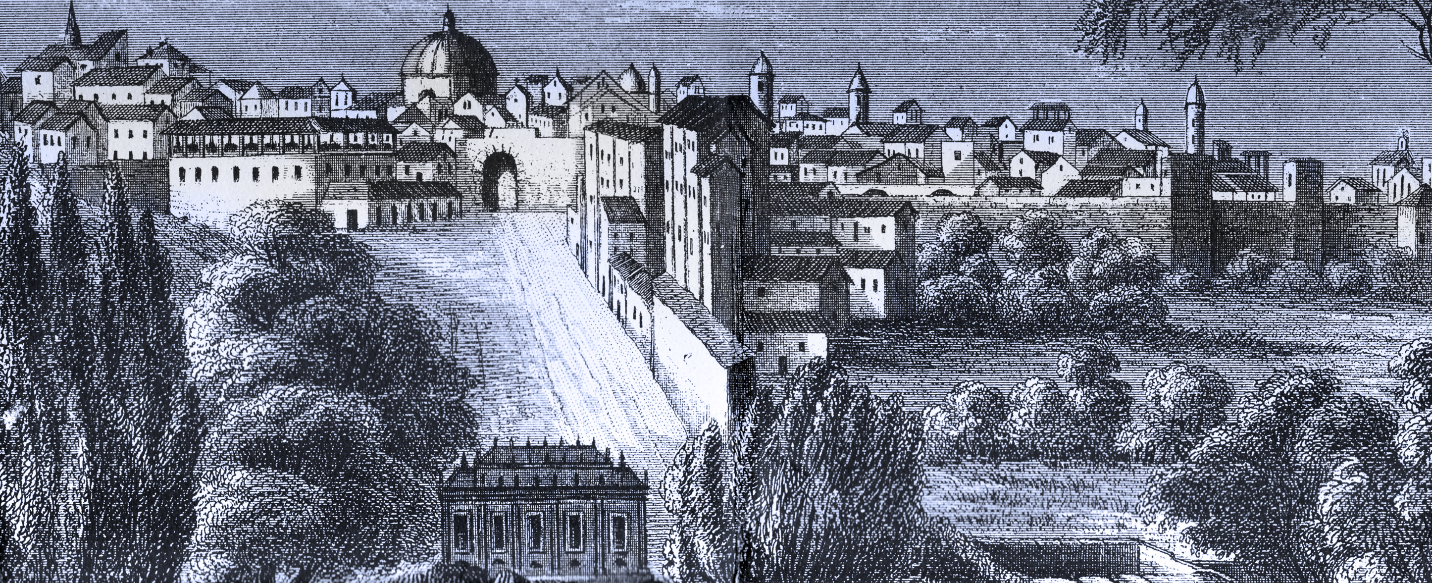 View of Sassari through Rosello Valley The Island of Sardinia 1849 John Warre Tyndale